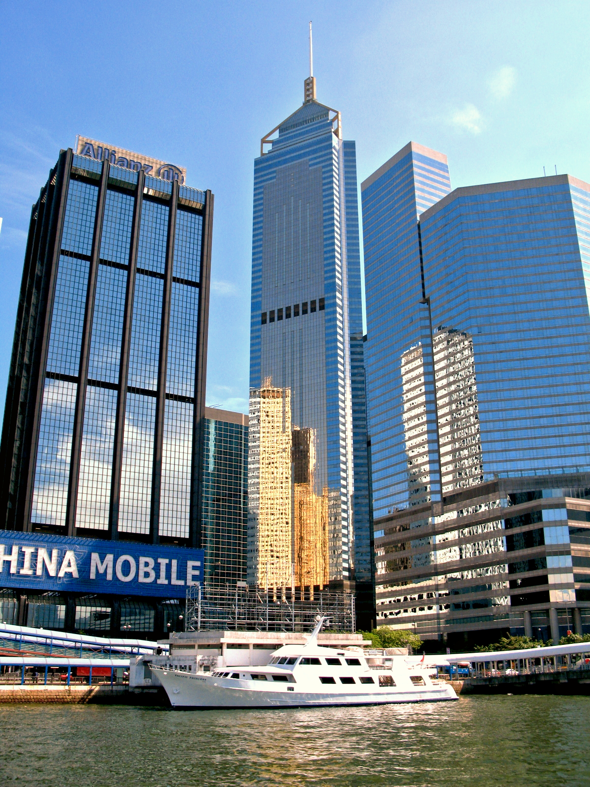 Central Plaza, Hong Kong 中環廣場